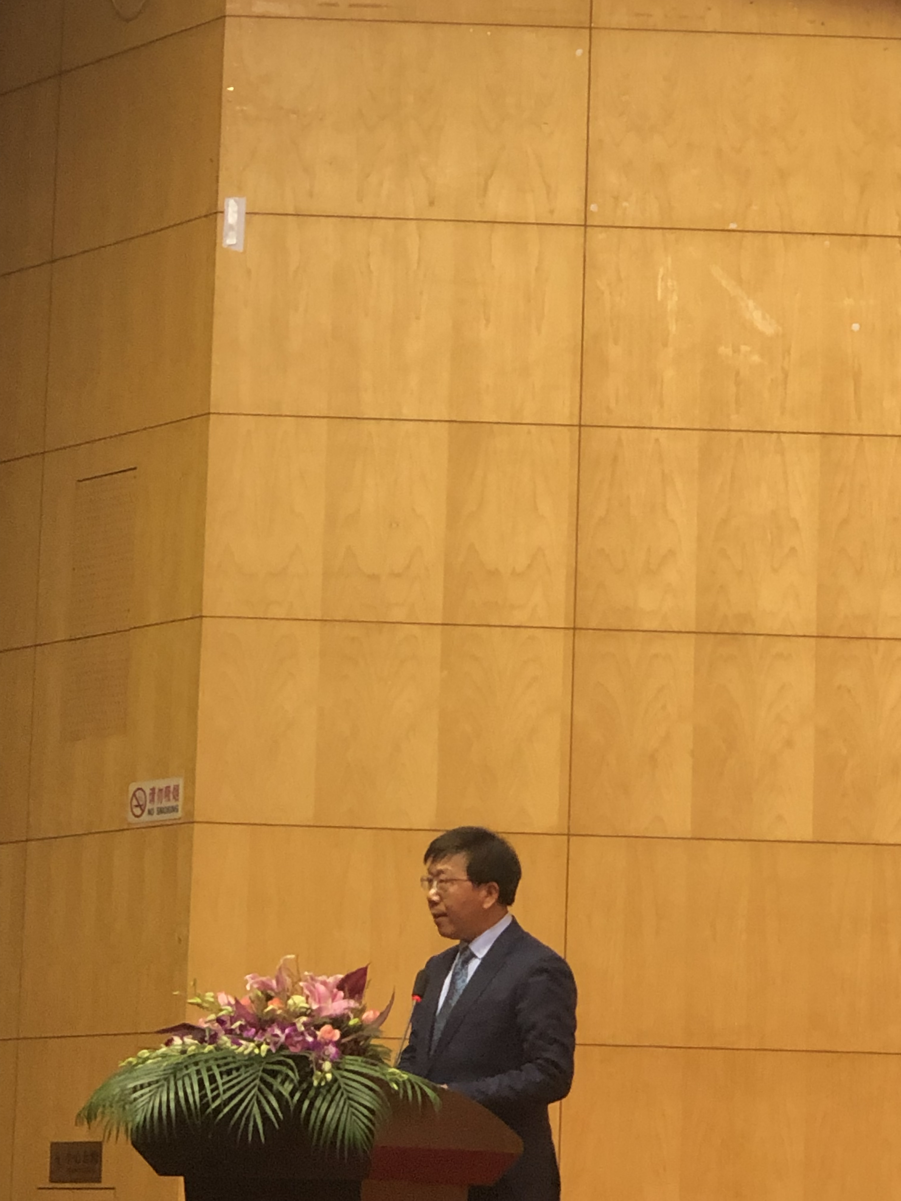 中文（中国大陆）: 钱旭红，华东师范大学校长